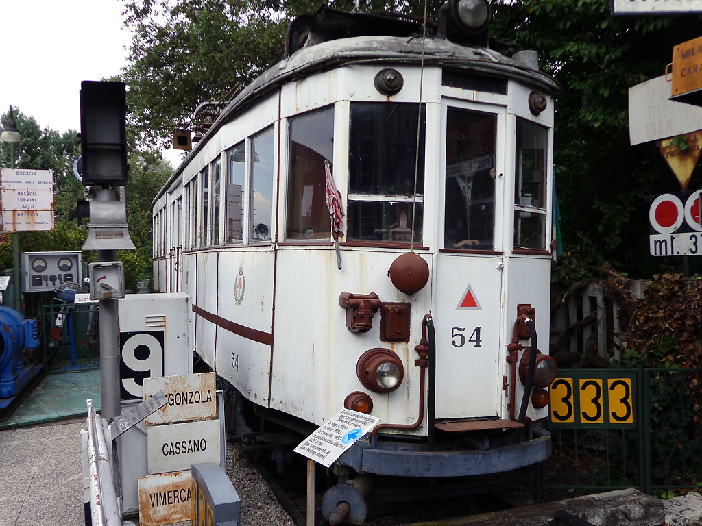 Vettura tranviaria interurbana n. 54 (tipo "Abbiategrasso") dell'ATM di Milano, conservata al Museo dei trasporti Ogliari di Ranco